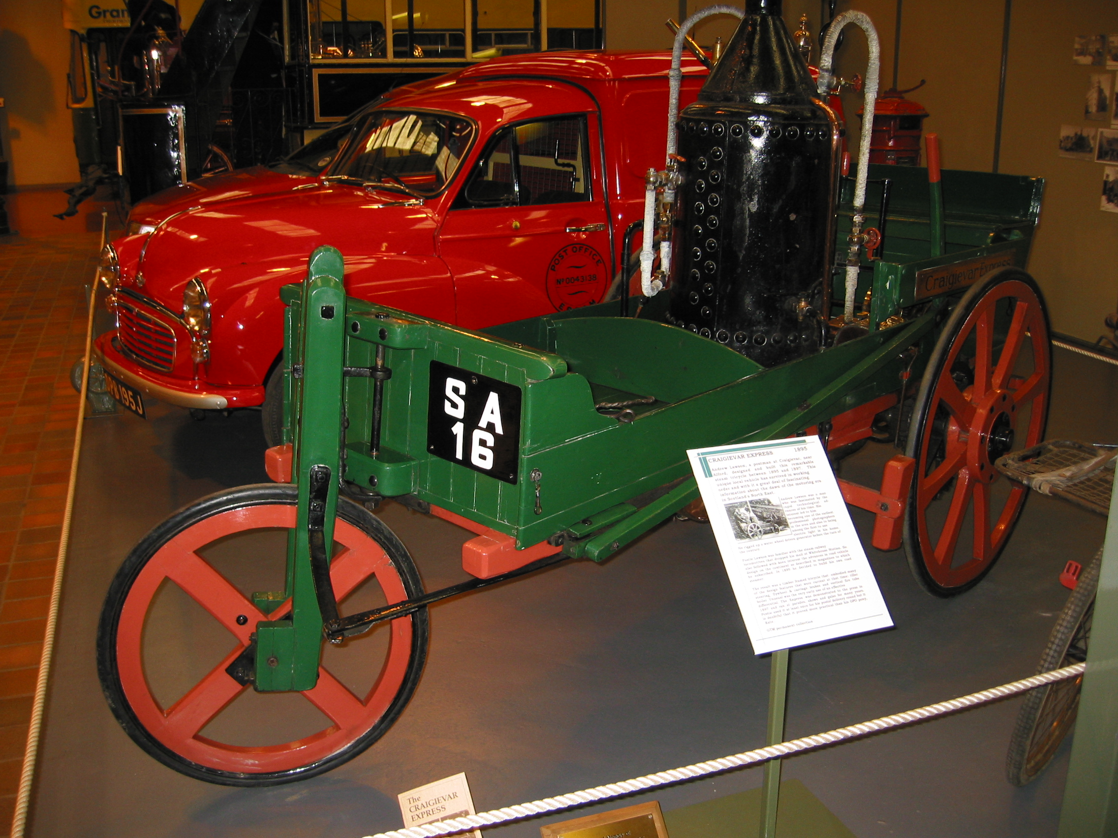 Craigievar 1895 im Grampian Transport Museum.